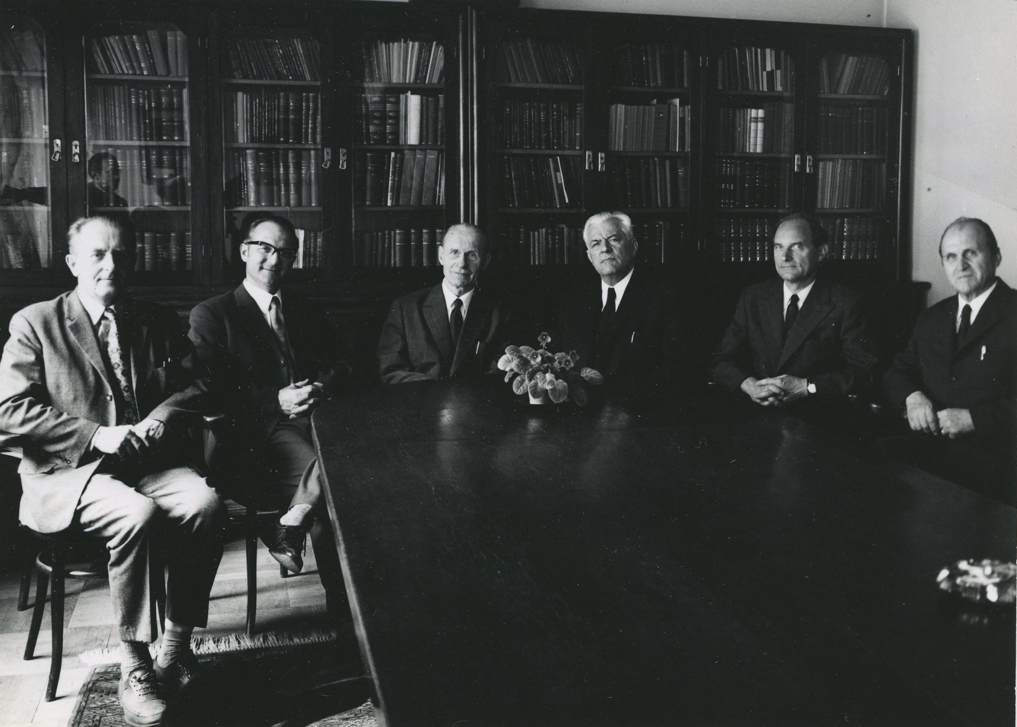 Synodní rada 1971 zvolená 17. synodem v zasedací síni Husova domu. Zleva: Laický člen syn. rady Miloš Lešikar, náměstek syn. kurátora Doc. Jaro Křivohlavý, syn. kurátor JUDr. František Škarvan, syn. senior Václav Kejř, náměstek syn. seniora PhDr. Jan Pokorný, duchovenský člen syn. rady Miloš Šourek